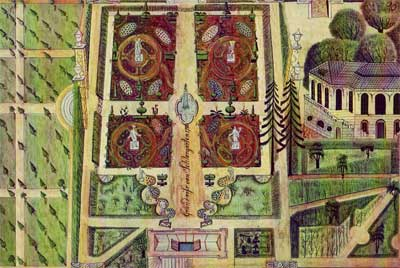 Schlosspark Altenburg um 1700 (Ausschnitt)